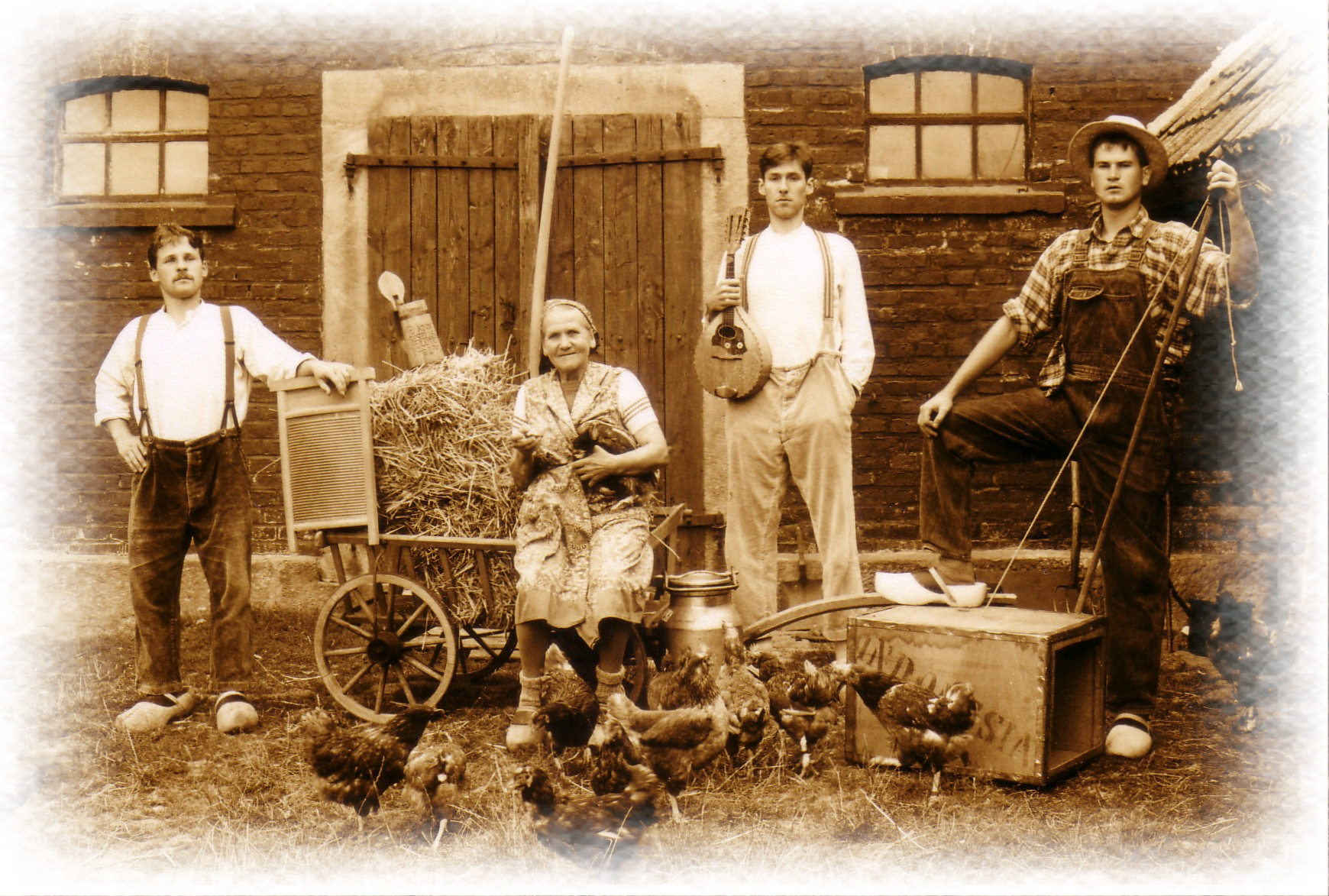 Die Rhöner Säuwäntzt (Christoph Leipold, Agatha Bolz † (kein Band-Mitglied / no Member of the Band), Martin Caba, Christoph Günther - from left to right / von links nach rechts)